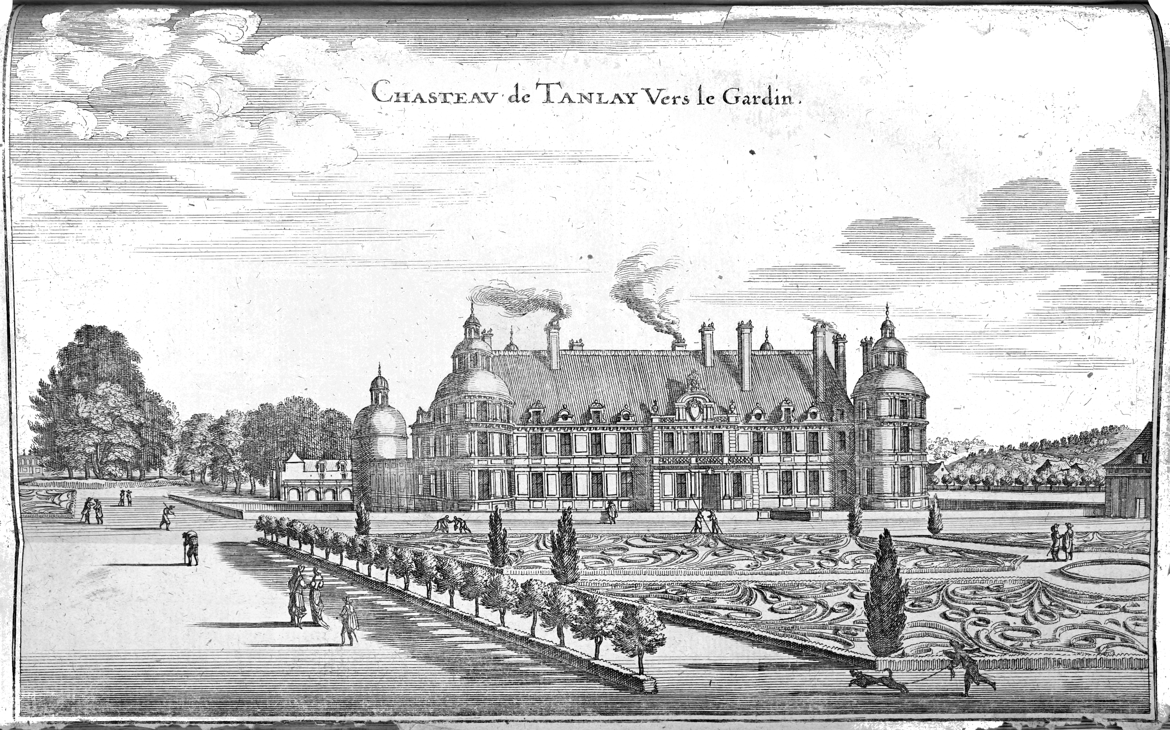 extrait de "topographia galliae".